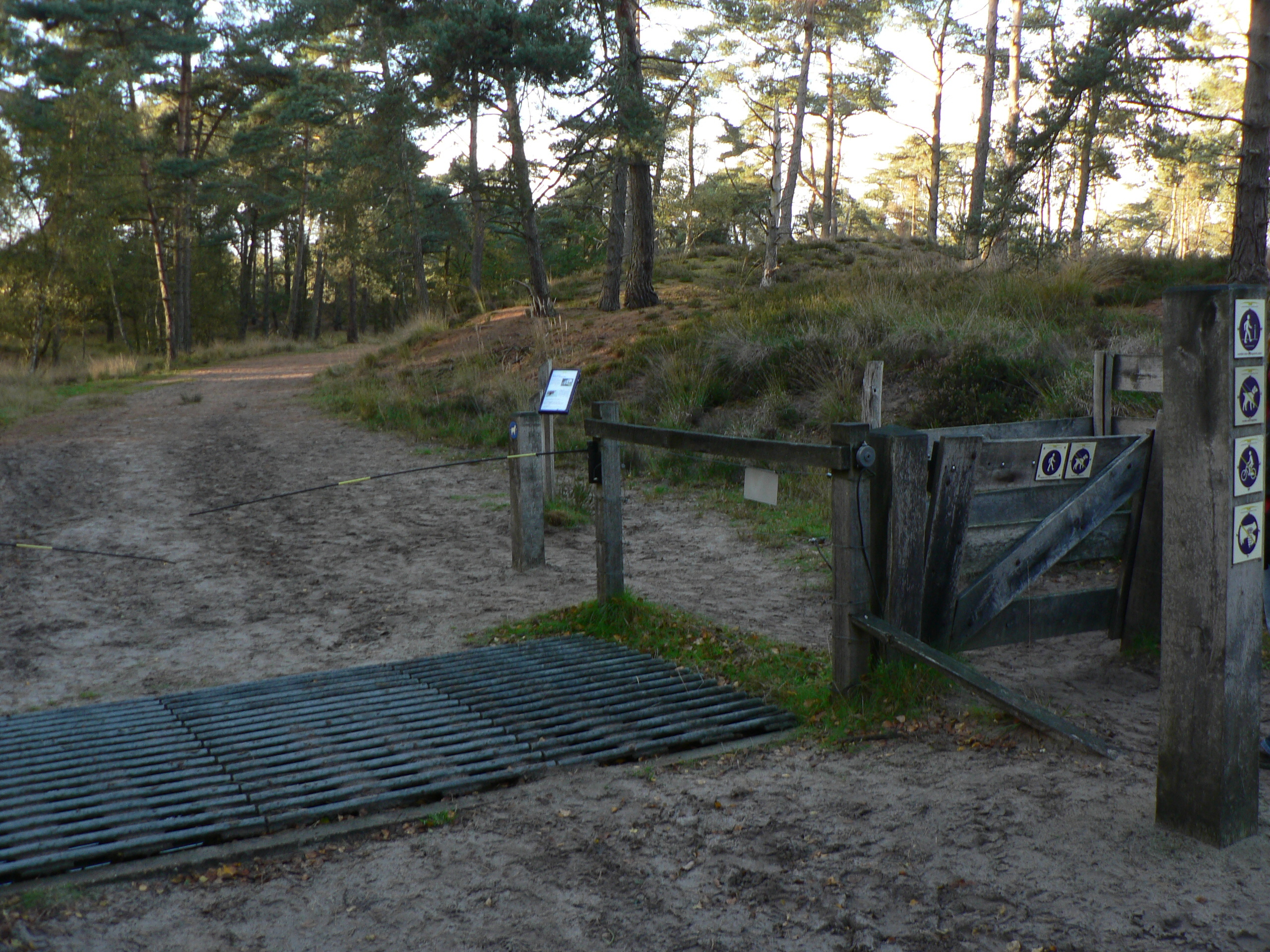 cattle grid - Kalmthout nature reserve nabij wandeling schaap